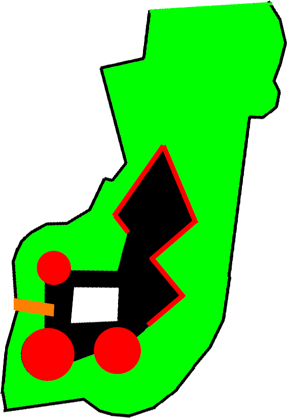 castello di otranto visto dall'alto